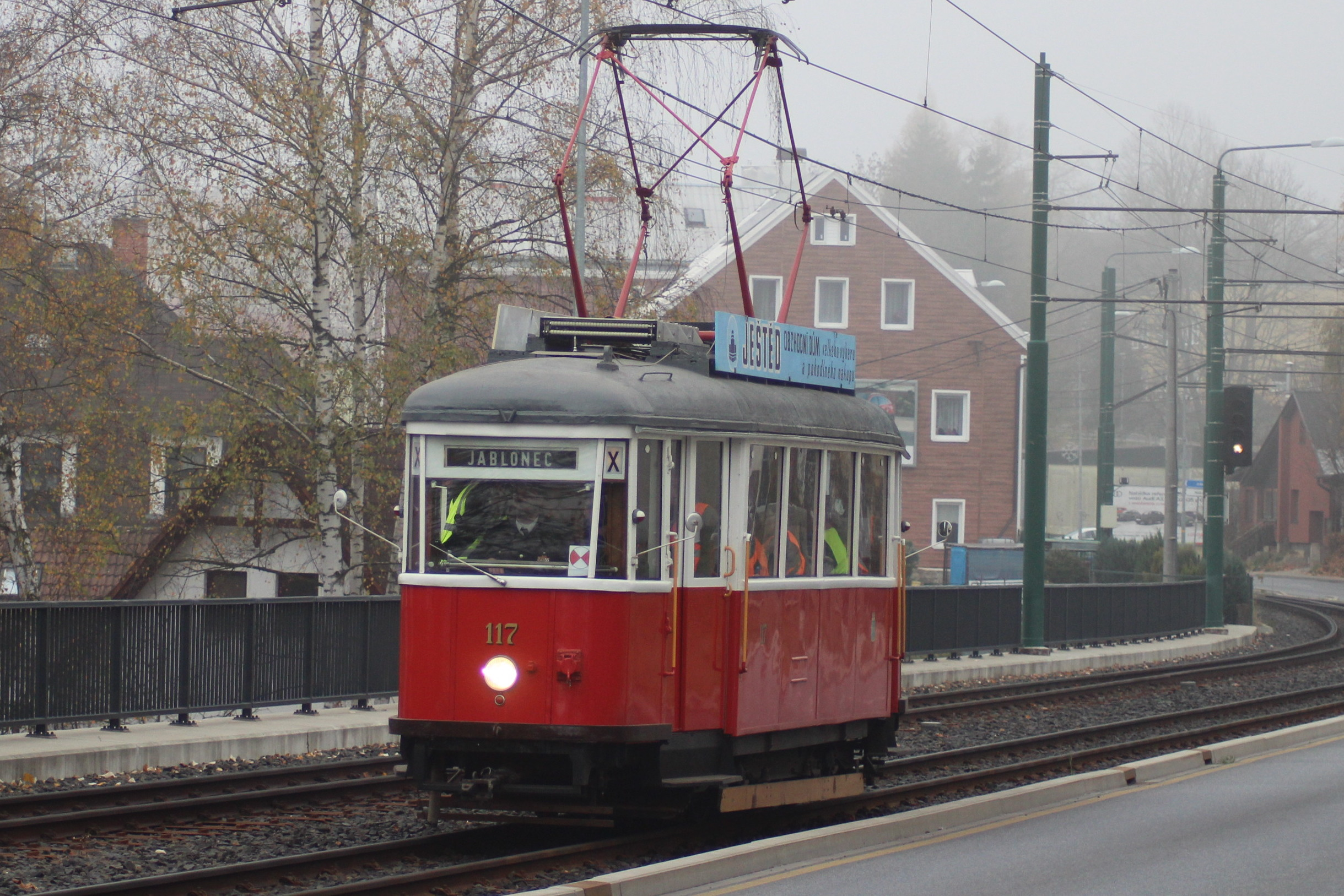 Liberecká historická tramvaj 6MT ev. č. 117